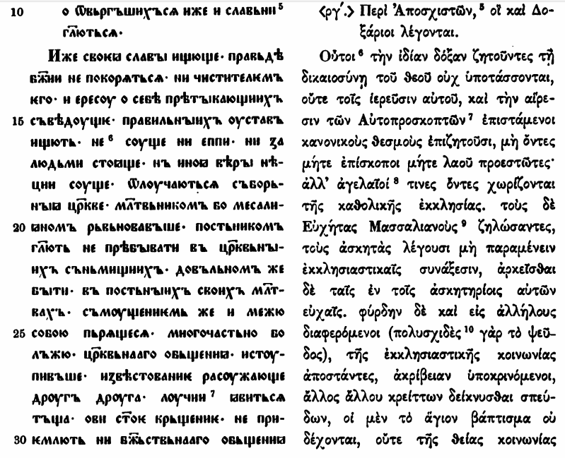 Апосхисты в книге Бенешевич В. Н. Древнеславянская кормчая XIV титулов без толкования. СПб, 1907. Т. 1.